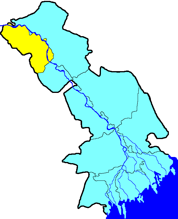 Черноярский район на карте Астраханской области